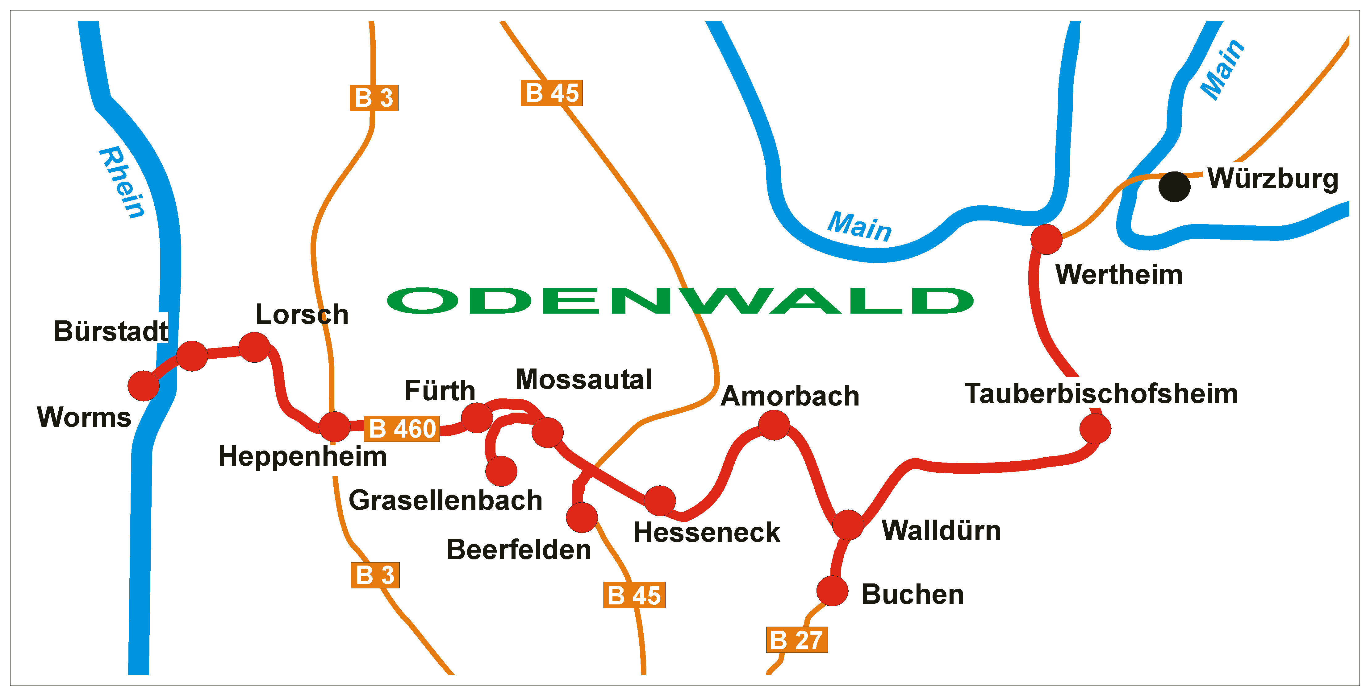 Verlauf der Siegfriedstraße Fotograf: presse03, selbst erstellt 2005 Lizenz: GNU-FDL